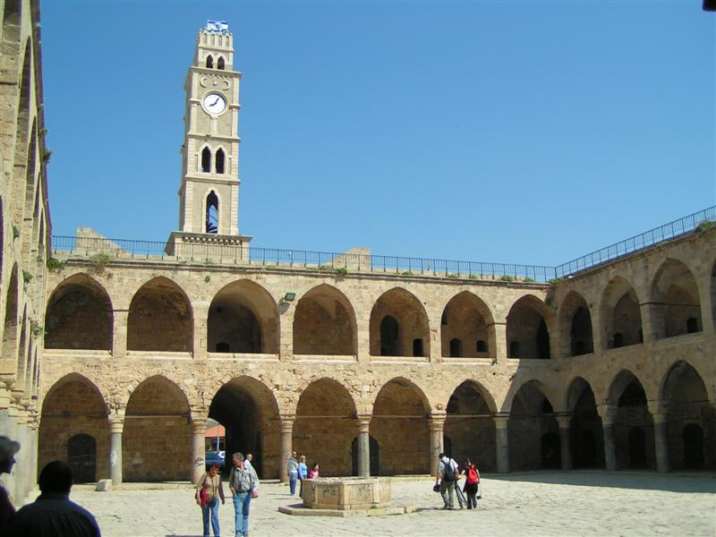 Acre